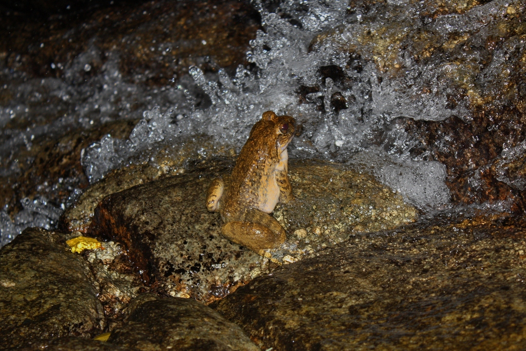 Taken at Tai Mo Shan.